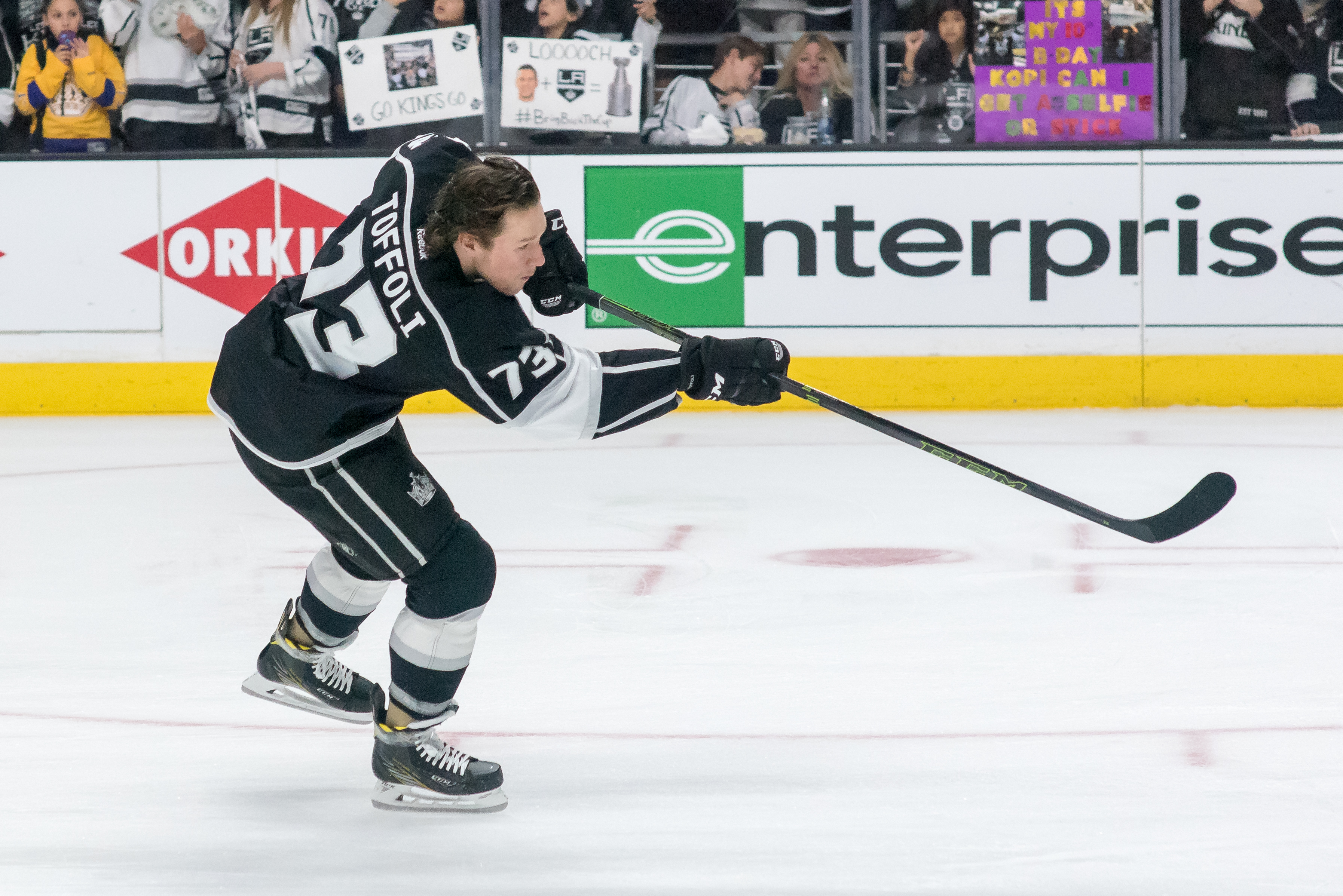 Tyler Toffoli